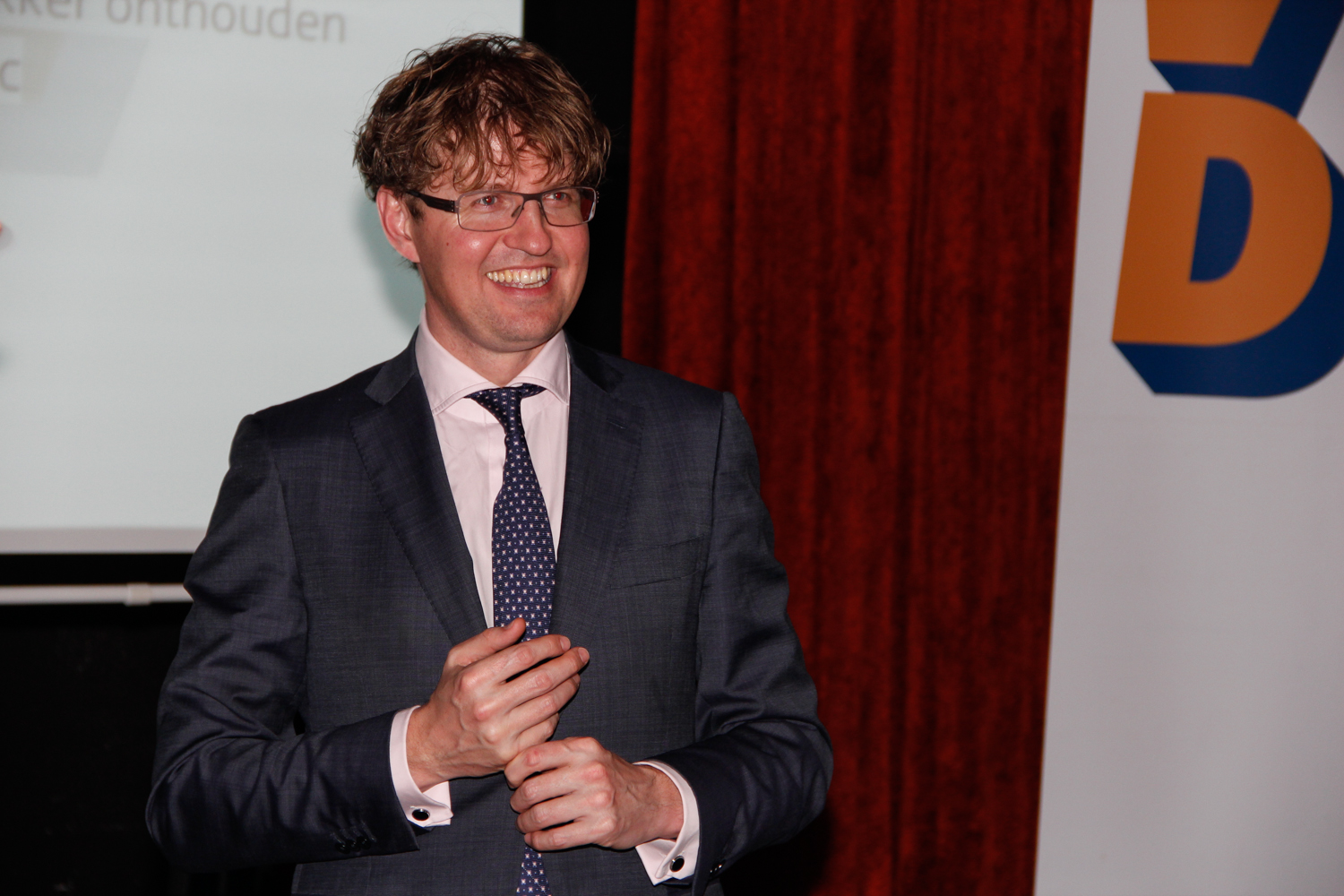 Staatssecretaris Sander Dekker tijdens een debat in Emmen voor de gemeenteraadsverkiezingen van 2014.